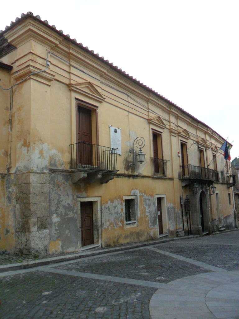 Gioiosa Jonica Palazzo Amaduri